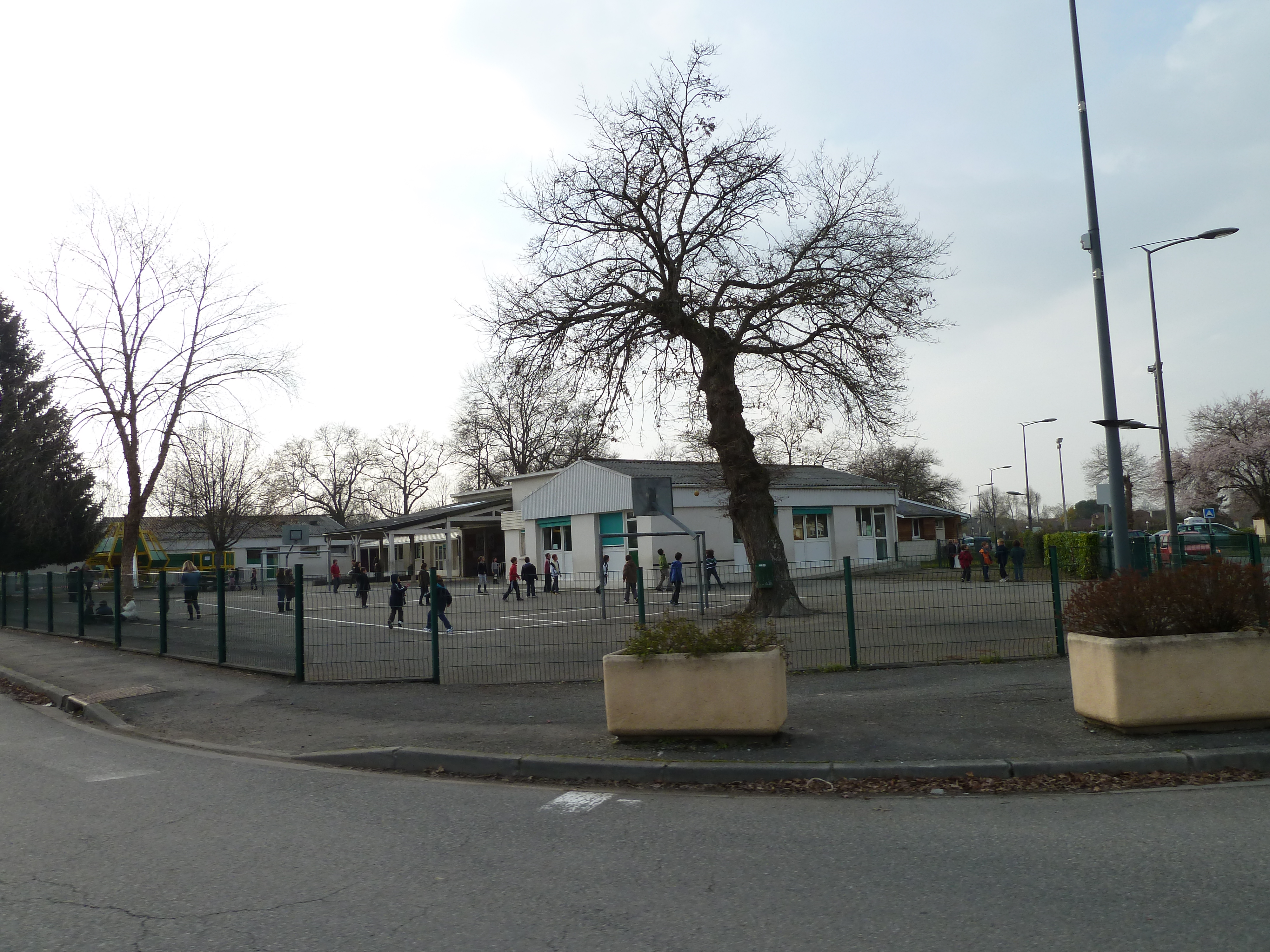 École de Montardon